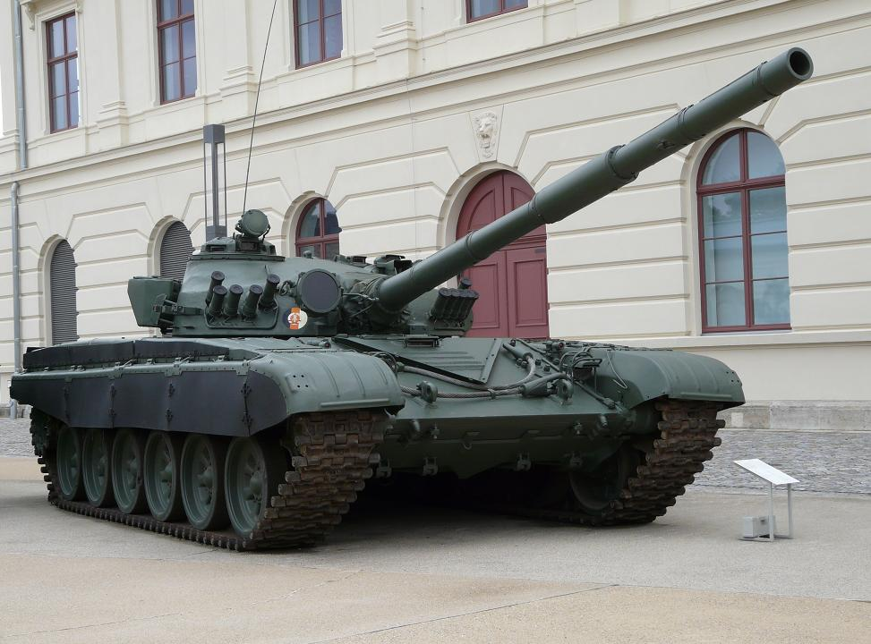 Sowjetischer Kampfpanzer T-72M der Nationalen Volksarmee der DDR im Militärhistorischen Museum Dresden